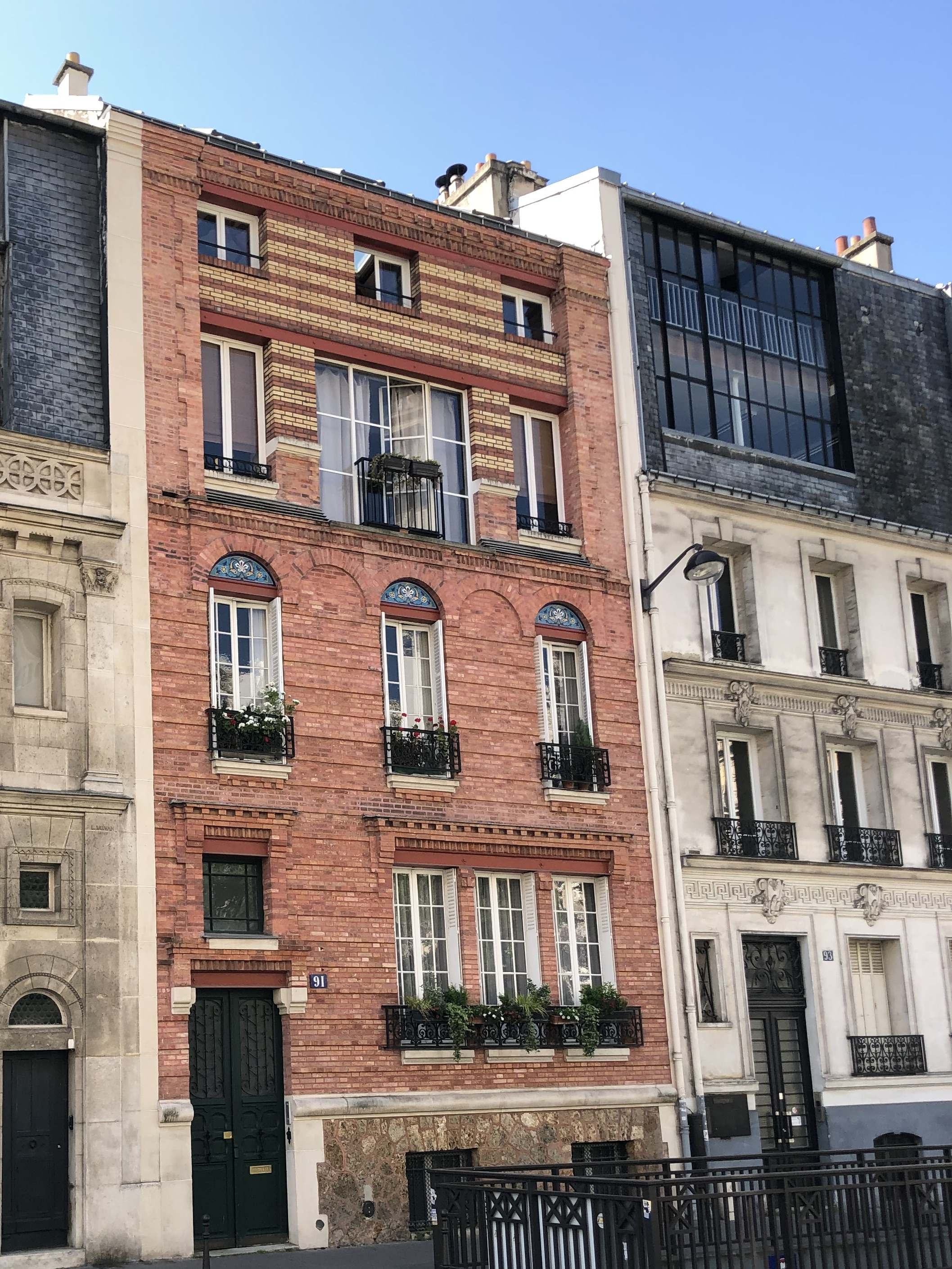 Hôtel particulier fin XIXème par Stephen Sauvestre, au 91 rue Ampère, Paris 17ème